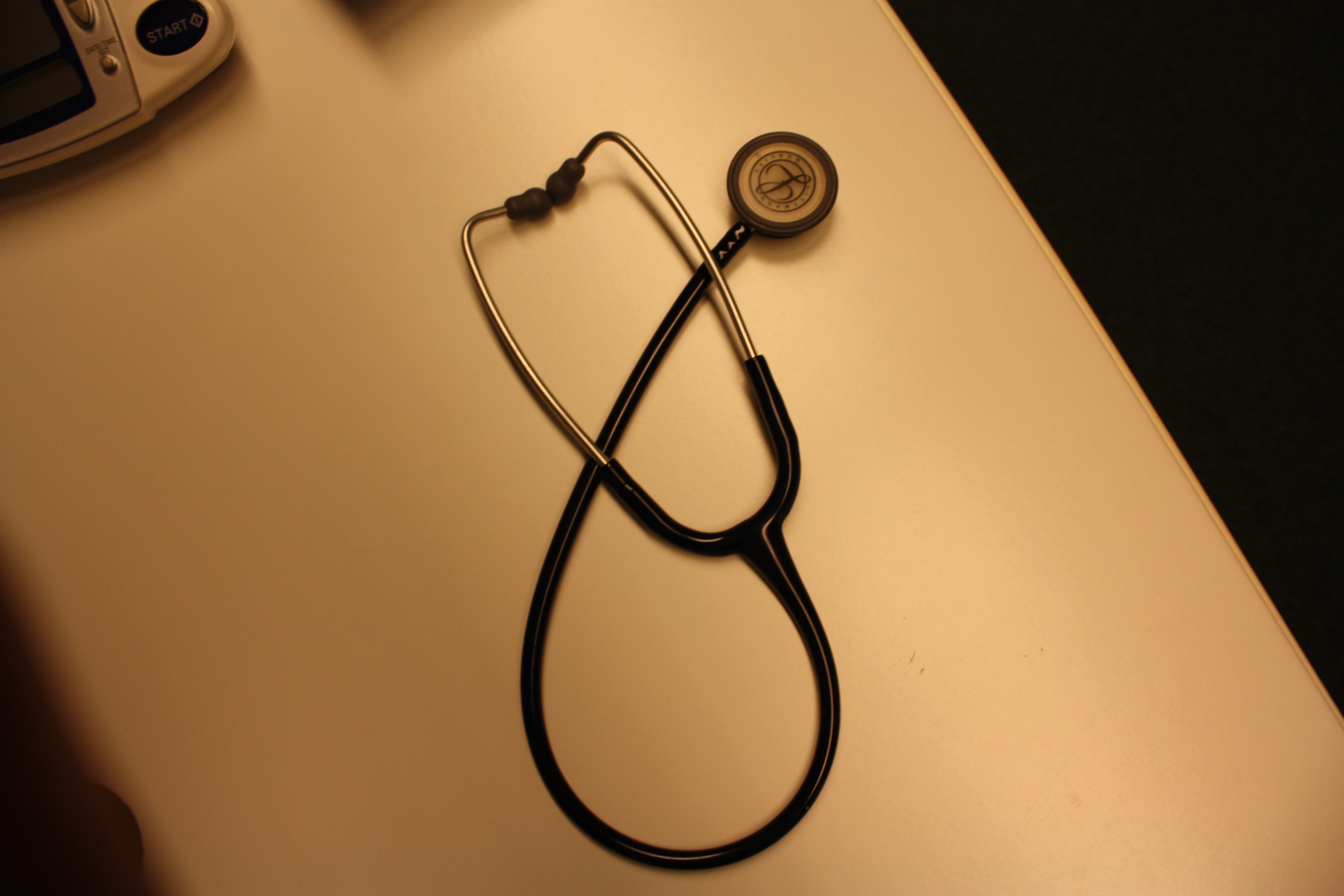 Stethoskop